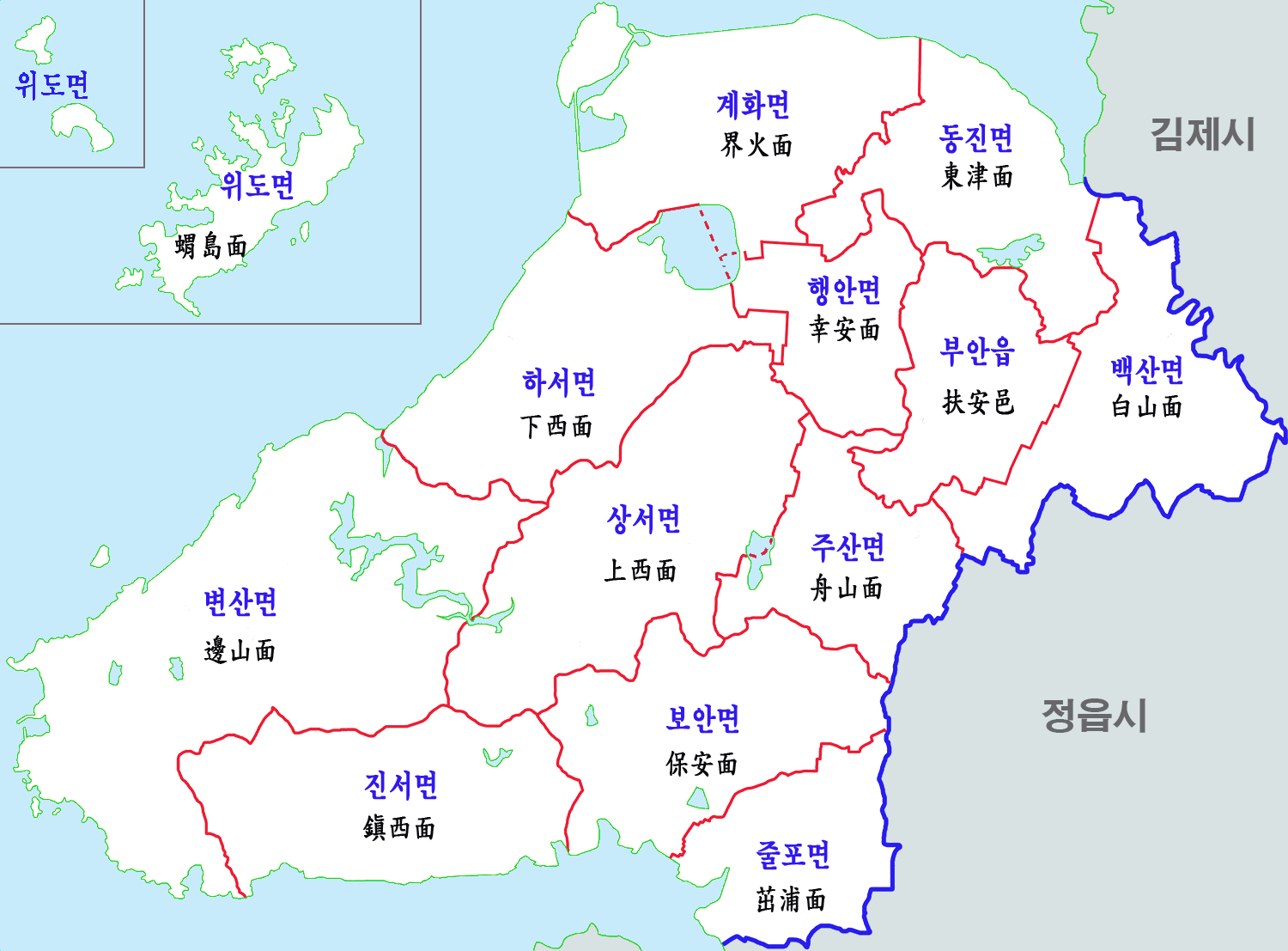 부안군 행정구역도